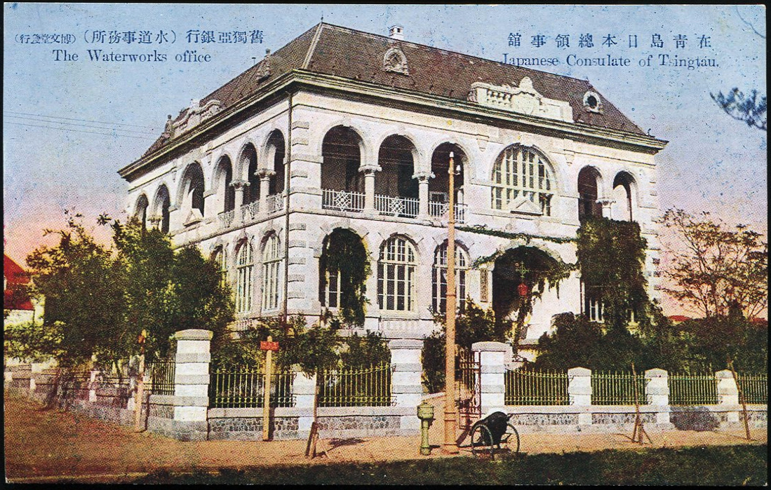 青岛日本总领事馆